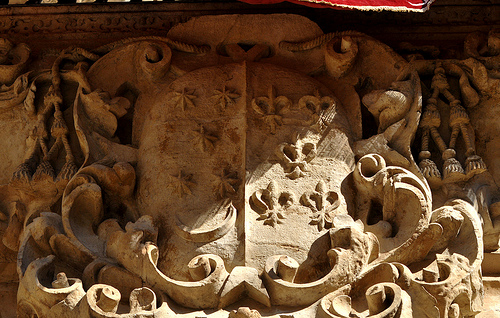 Escudo del cardenal Manuel Arias y Porres (1638-1717), que fue arzobispo de Sevilla y presidente del Consejo de Castilla, en la fachada del Palacio arzobispal de Sevilla, (España).